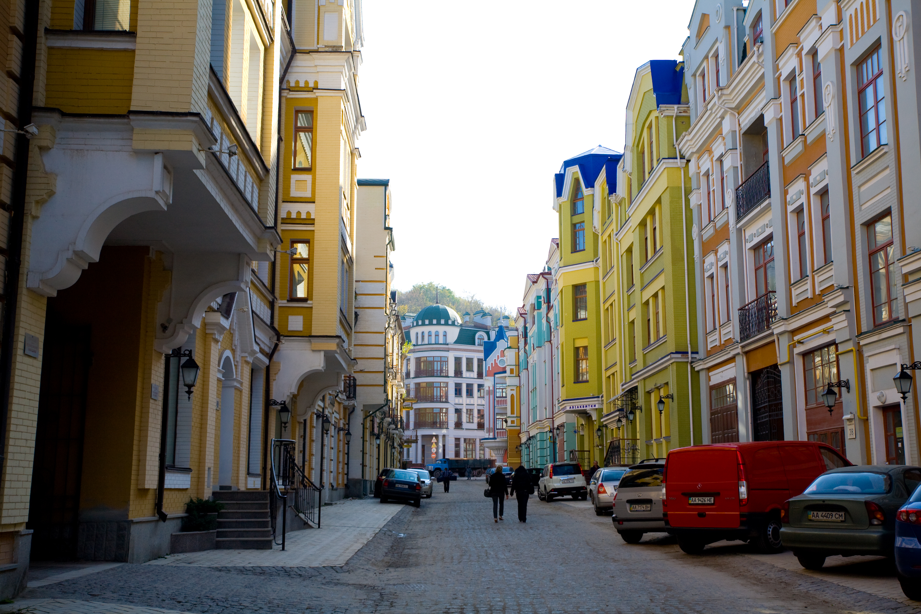 Жилой Комплекс "Воздвиженка"